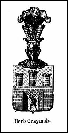 Герб Гжимала шляхетської родини Лудзіцьких